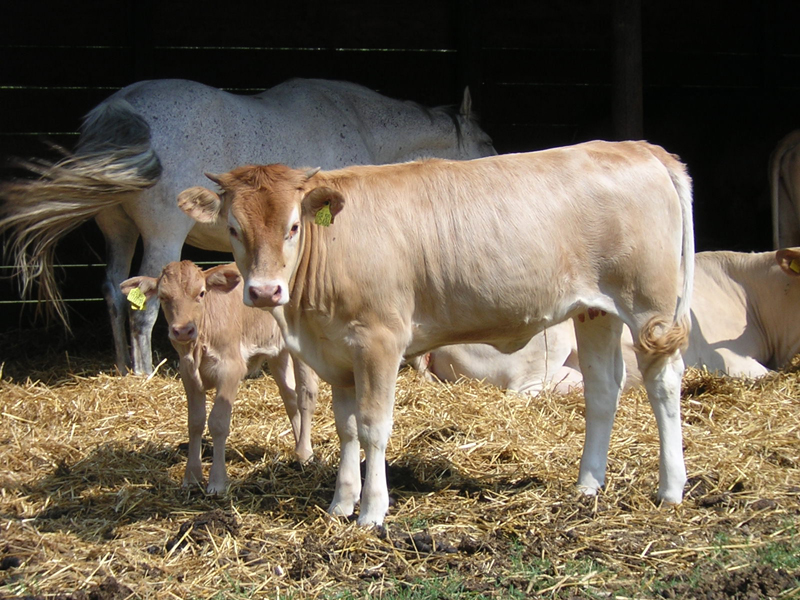 Bovino